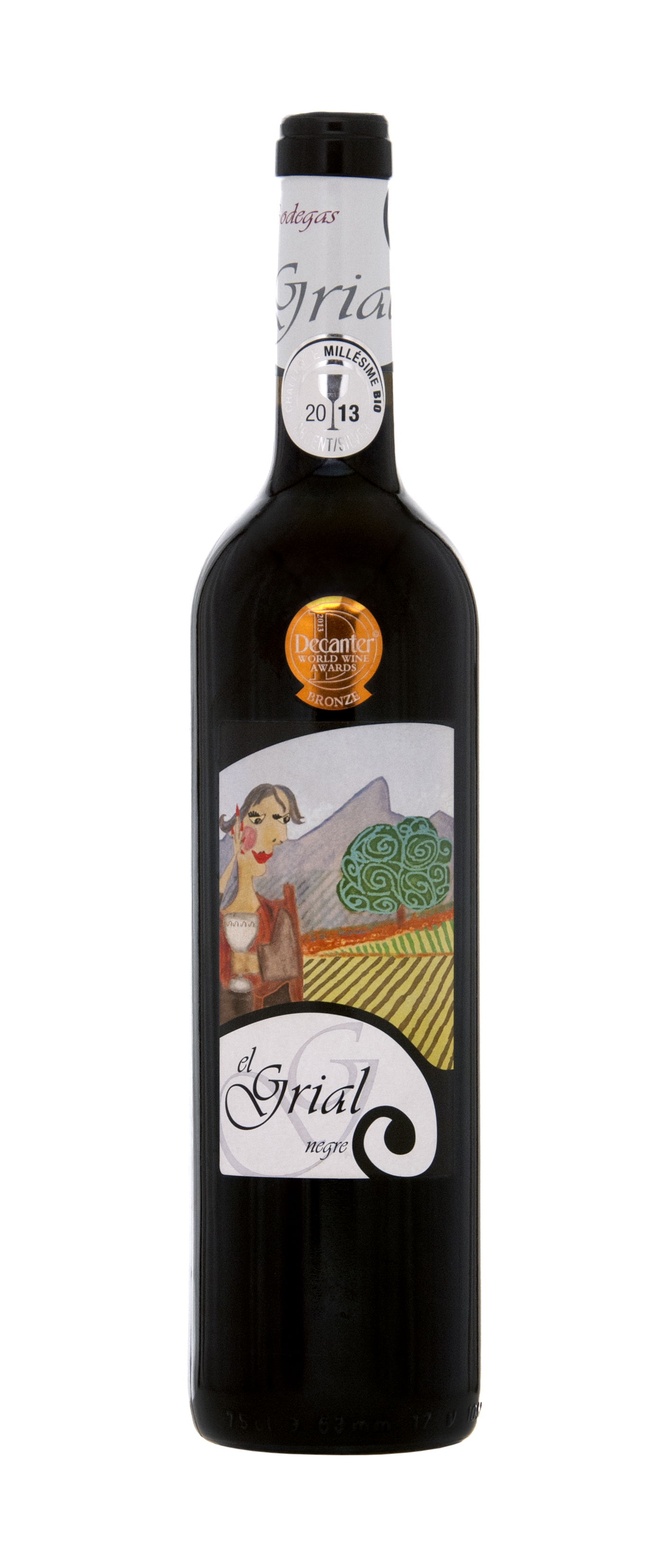 vinos ecológicos D.O. Catalunya de Bodega el Grial